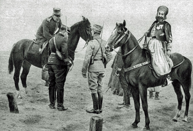 Le Miroir N° 67 page 2 Khaled el-Hassani el-Hachemi et un général belge lors d'une remise de médailles dans le nord de la France lors de la Première guerre mondiale.